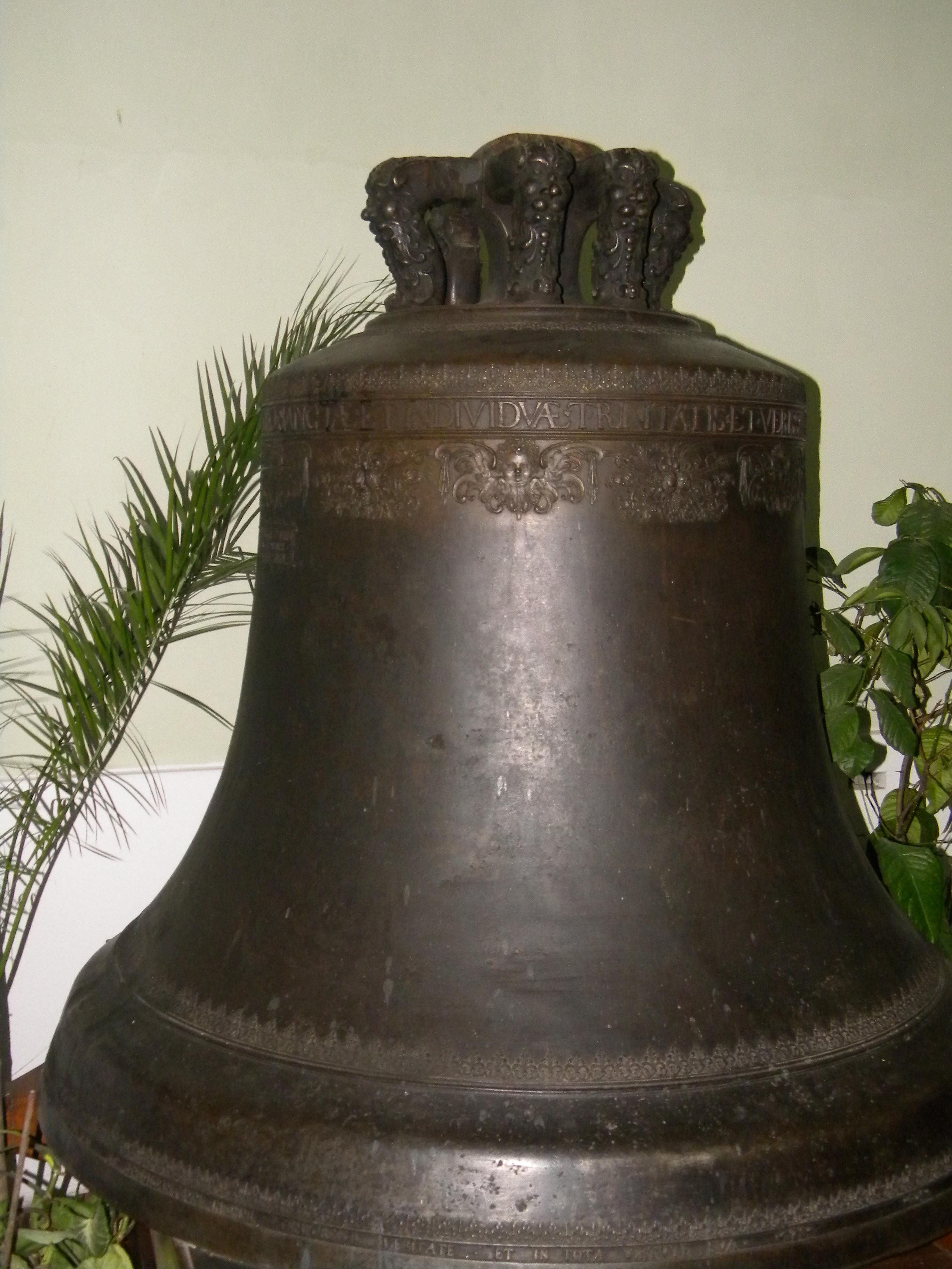 A régi templomharang (1633-ban öntötte Georg Wierd harangkészítő mester)